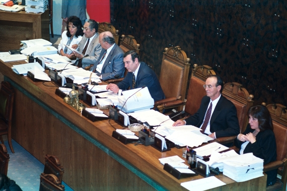 Fotografía de la Sesión 8ª, en martes 7 de julio de 1992, Legislatura 324ª Ordinaria. De izquierda a derecha en la testera: María Angélica Bennett Guzmán, oficial mayor del Senado Gustavo Yáñez Bello, secretario del Senado Rafael Eyzaguirre Echeverría, senador Mario Papi Beyer, prosecretario del Senado José Luis Lagos López y la abogada María Isabel Damilano Padilla. Congreso Nacional de Chile, Sede Valparaíso.